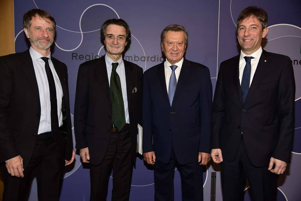 Milano, 3 maggio 2019, l'assessore Davide Caparini, il Governatore di Regione Lombardia Attilio Fontana, il presidente di Gazprom Viktor Zubkov, il vicepresidente della Regione Lombardia Fabrizio Sala